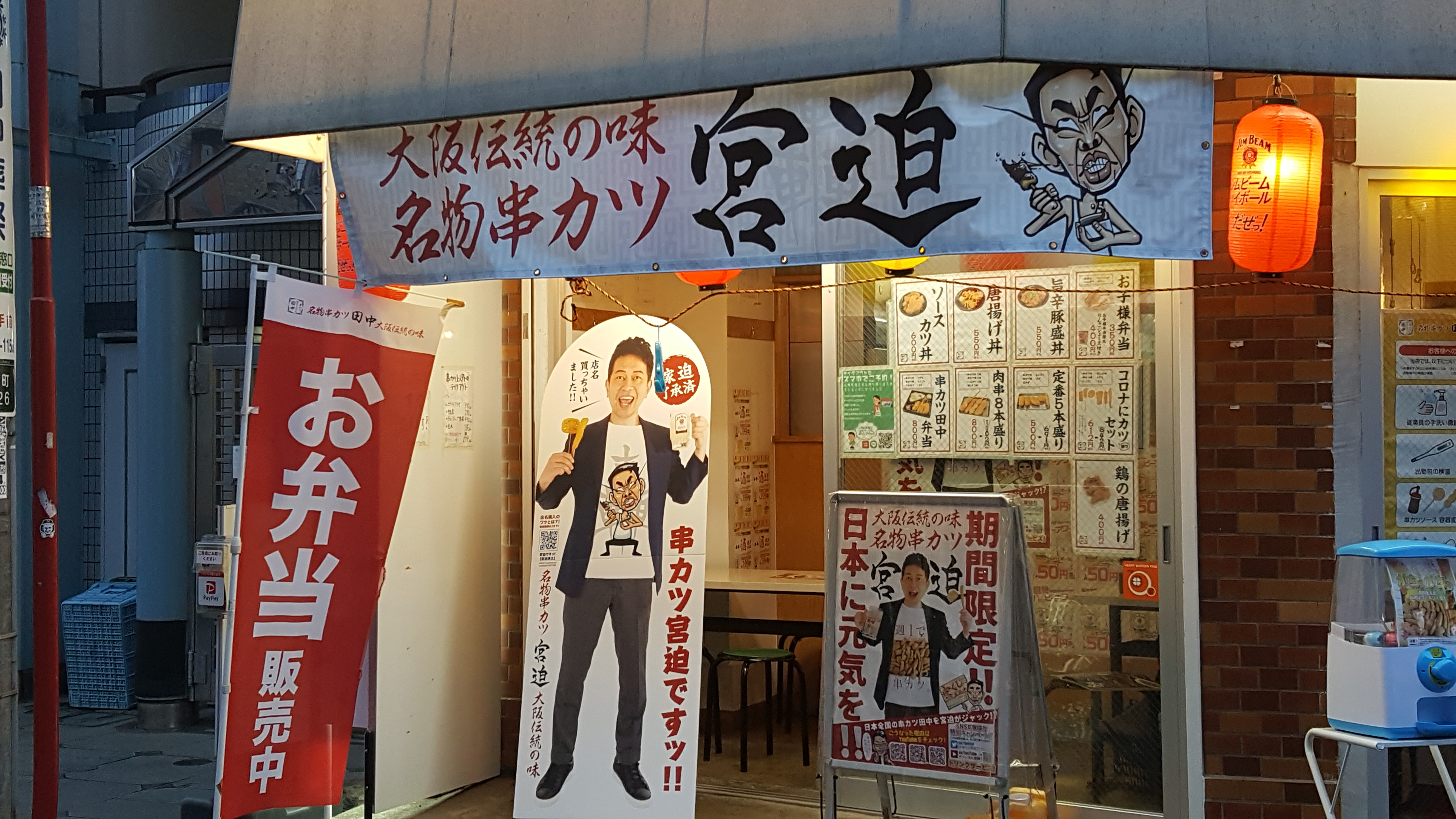 串カツ宮迫田無店